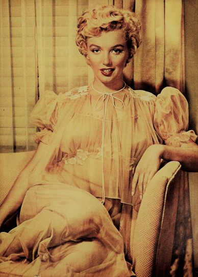 Marilyn Monroe